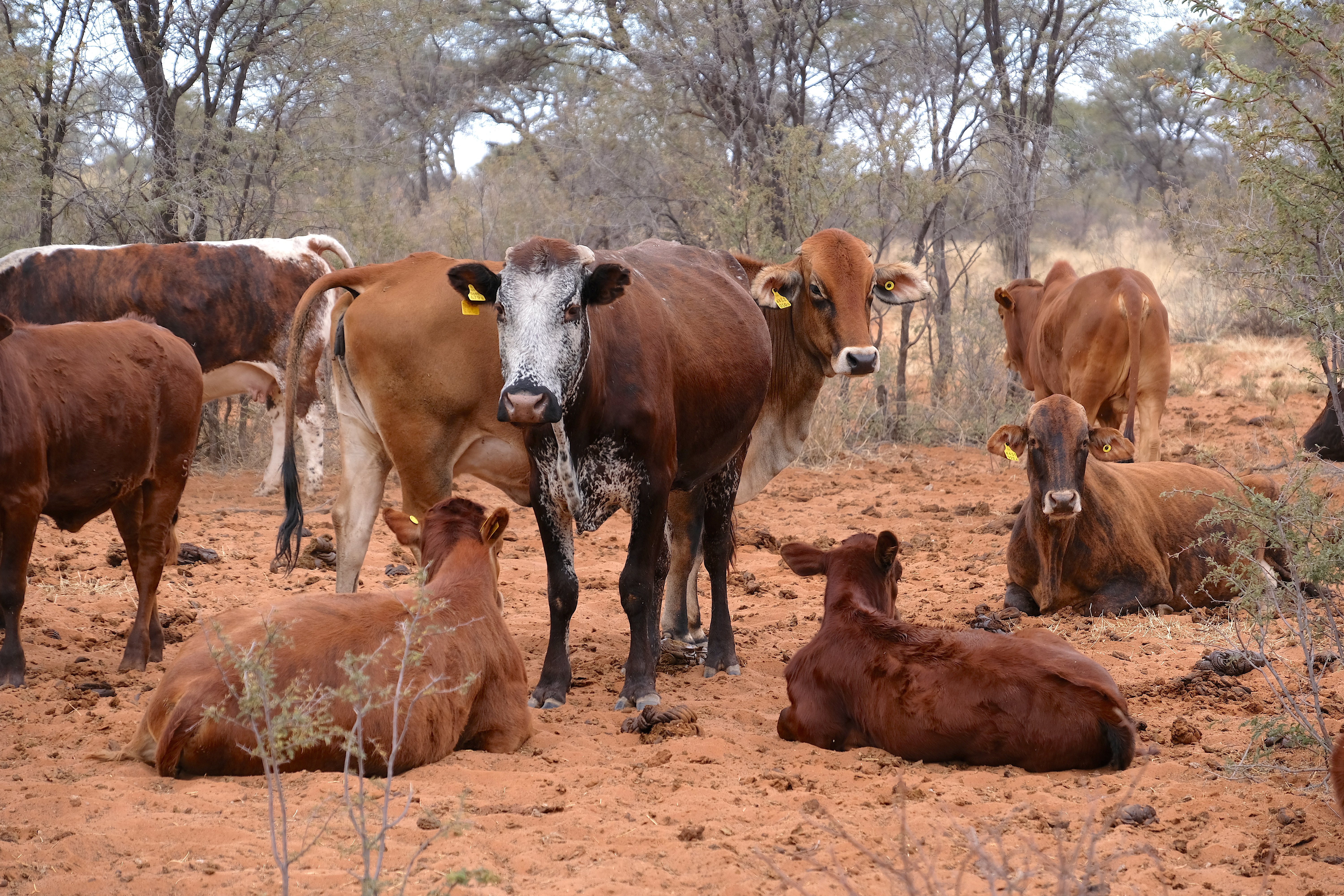 Viehwirtschaft in der Kalahari (Farm Makam 2018)